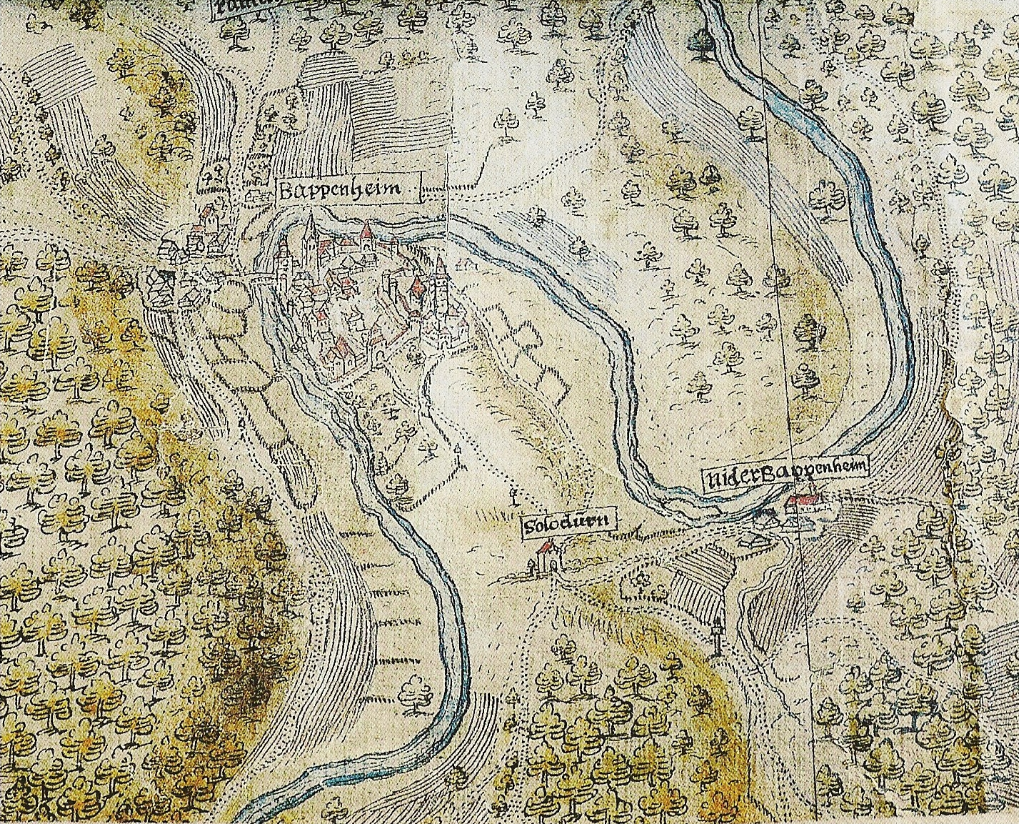 Stadt und Burg Pappenheim auf einer Landkarte vom um 1570.